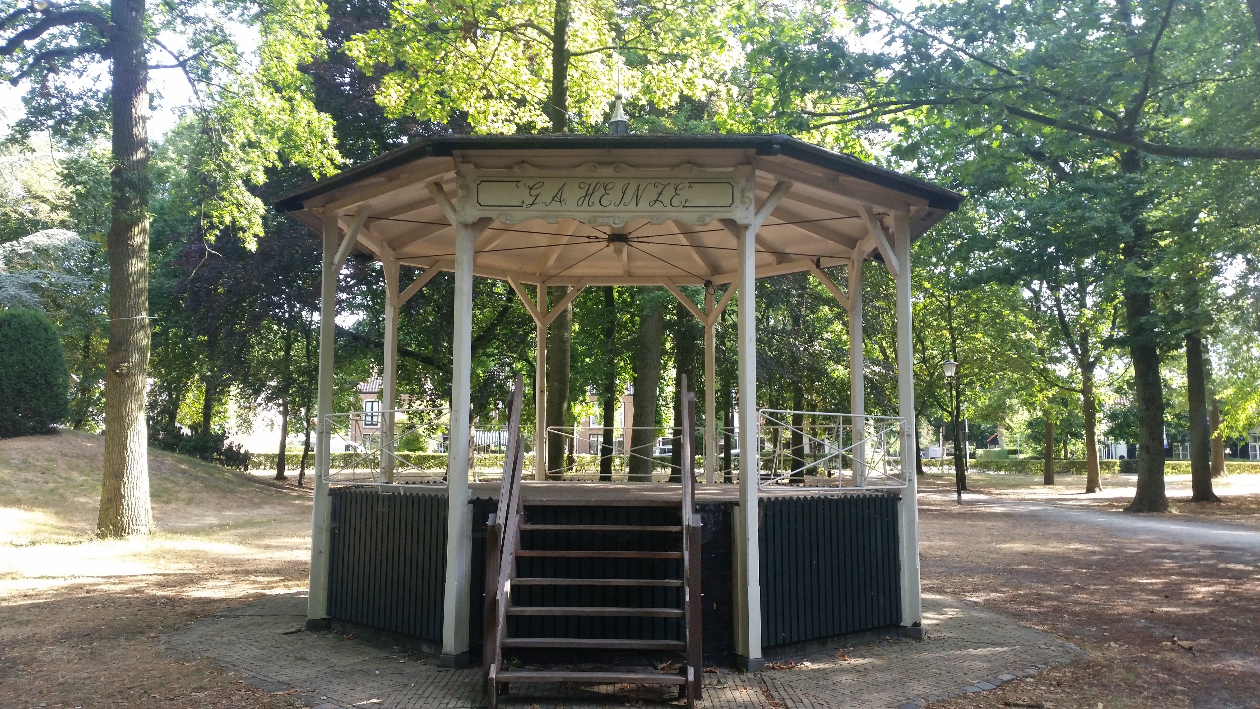 Muziekkoepel GA Heinze, midden op Brink, Muiderberg